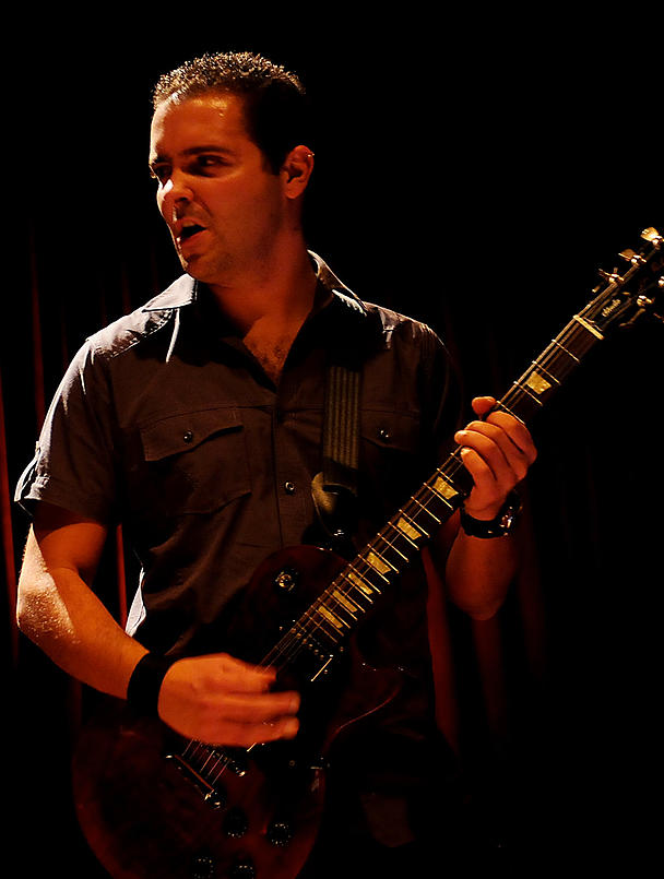 Alex Santos